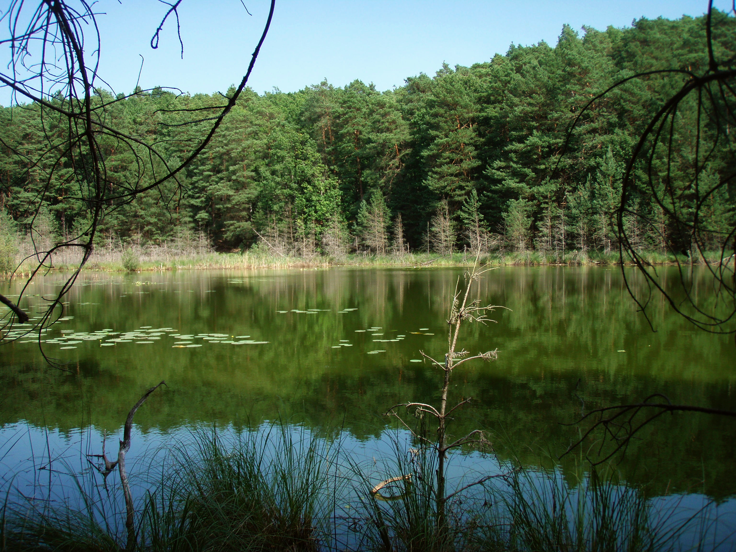 Der Teufelssee bei Siehdichum (Schlaubetal) im Naturschutzgebiet Teufelssee (54,47 ha, 1958 gegründet)